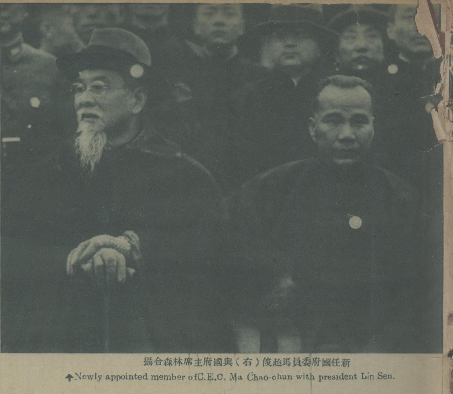 大眾畫報1935第16期附圖